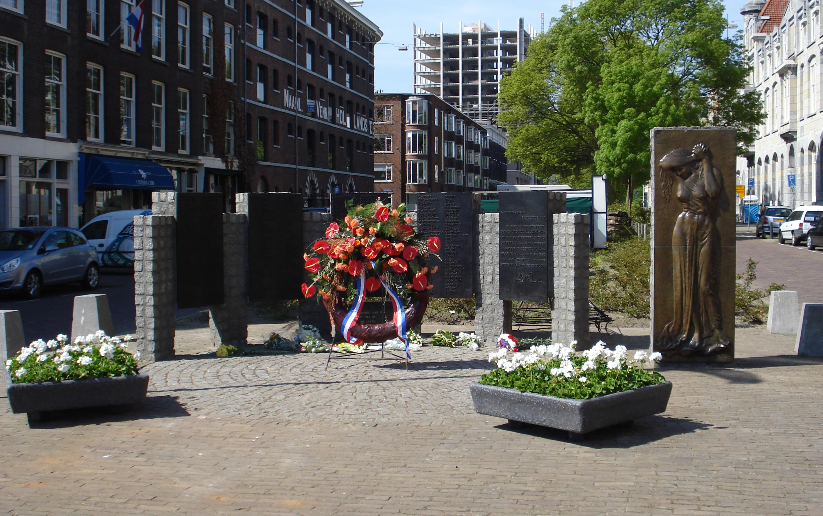 Rotterdam, Veerhaven/Calandstraat. Lloyd monument. Ontwerp: Architectenbureau Vermeer en Van Herwaarden, modellering bronswerk: Th.C. de Weger. Rotterdam/The Netherlands